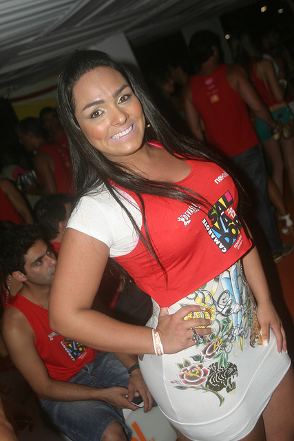 Cantora e modelo Andressa Soares, a "Mulher-Melancia" no carnaval da Bahia em 2012